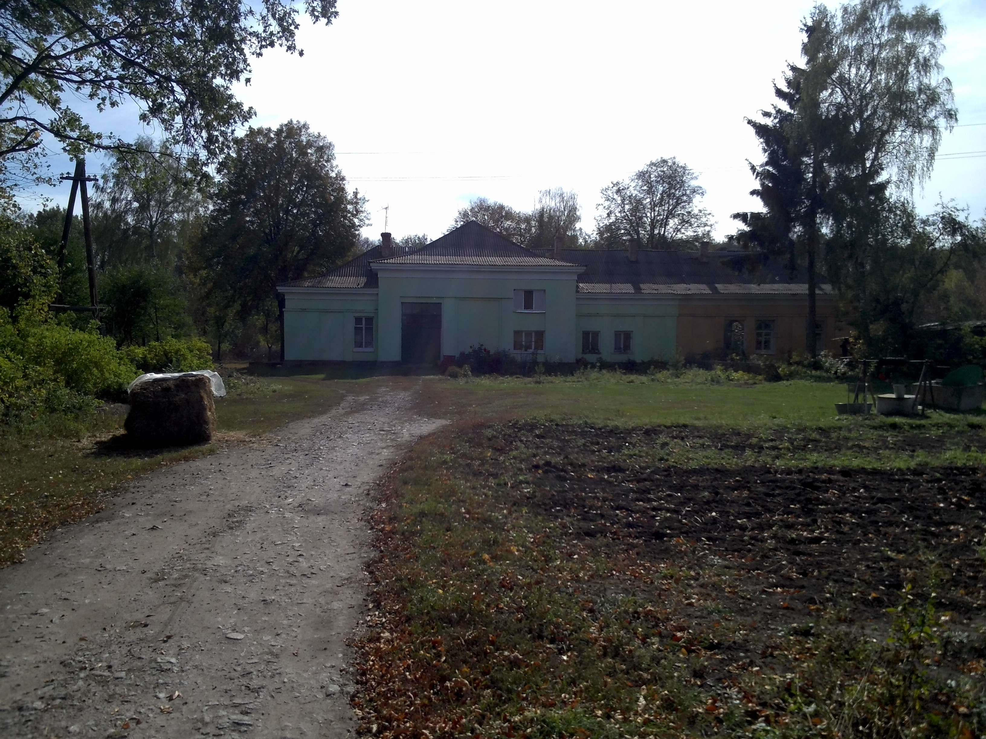 ст. Нова Гребля